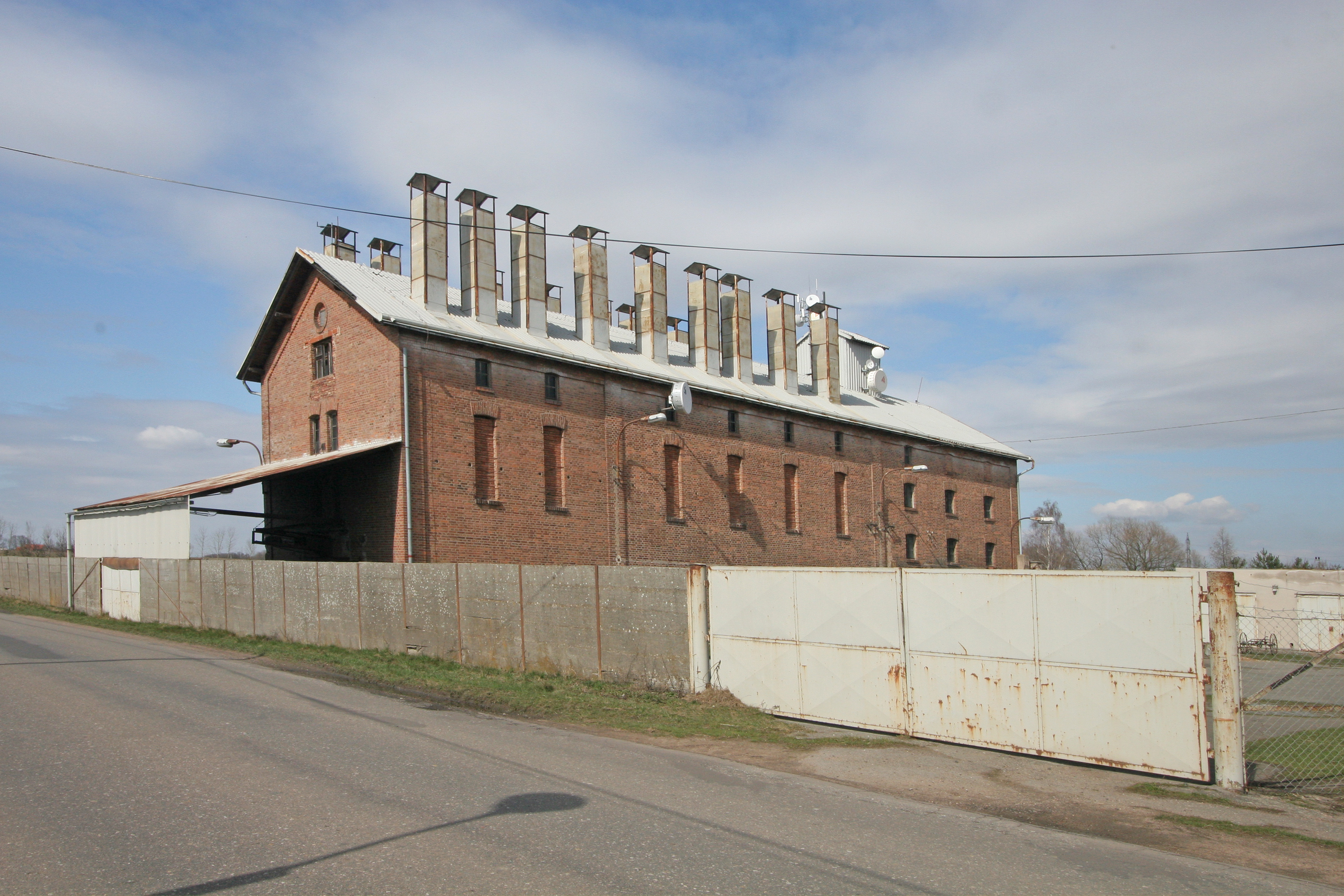 Bydžovská Lhotka sušárna čekanky